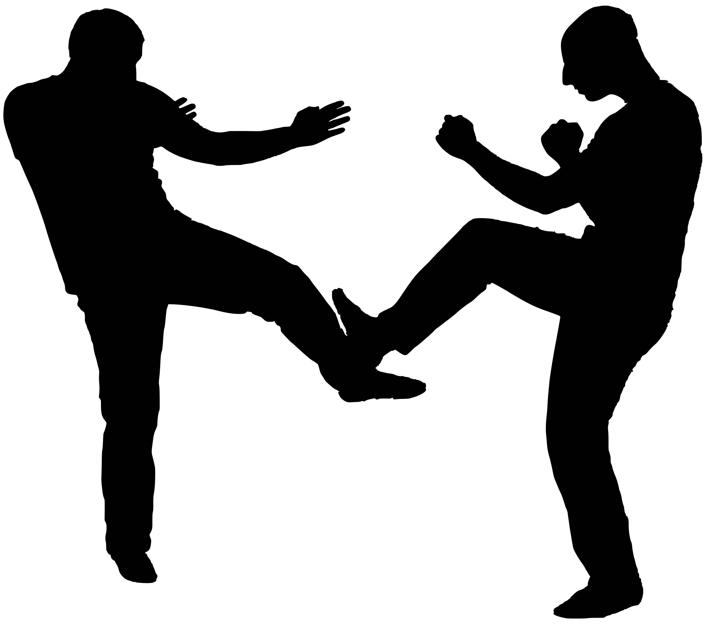 Wing chun chi gerk low kick outline